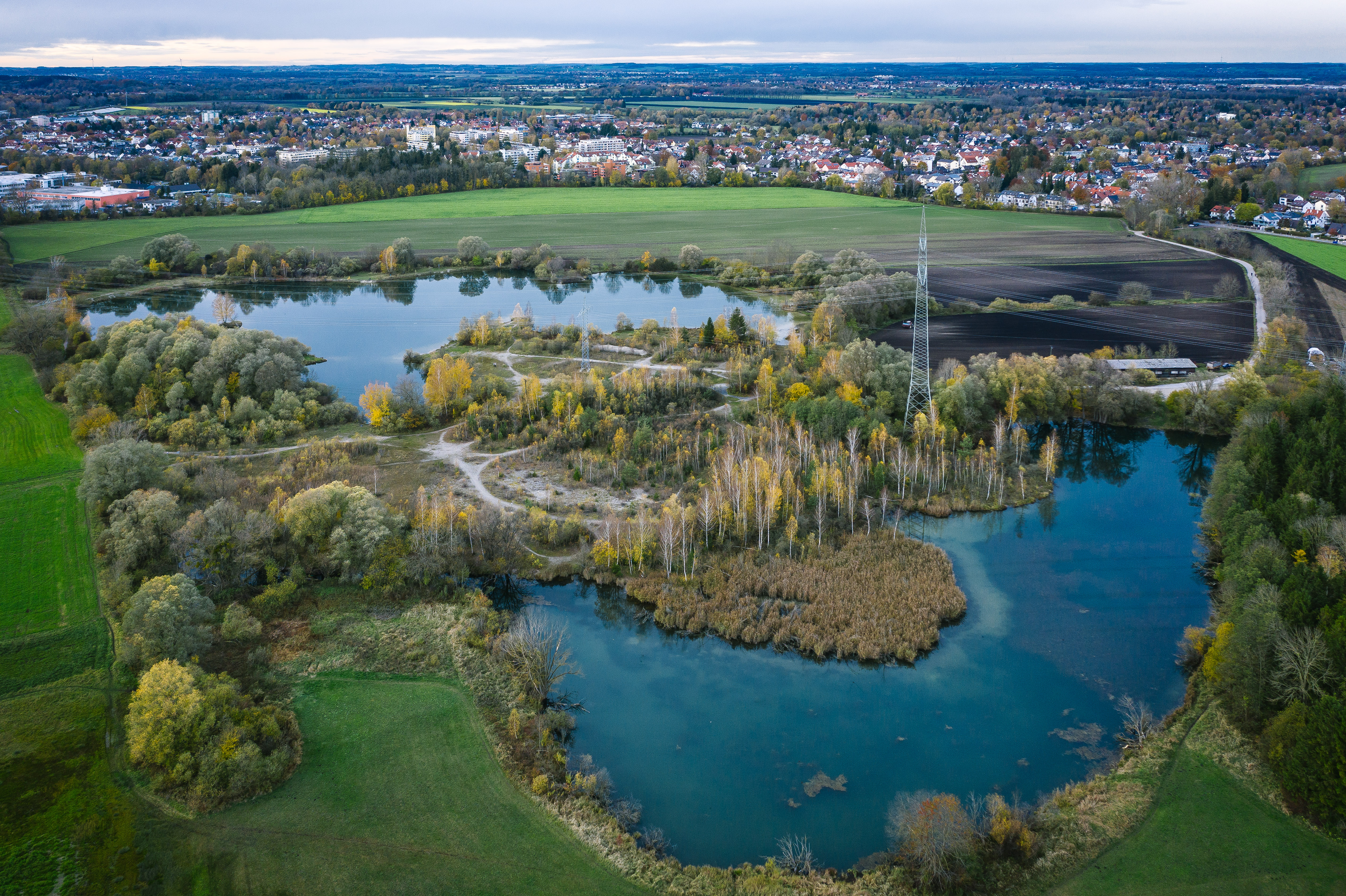 Luftaufnahme, Böhmerweiher